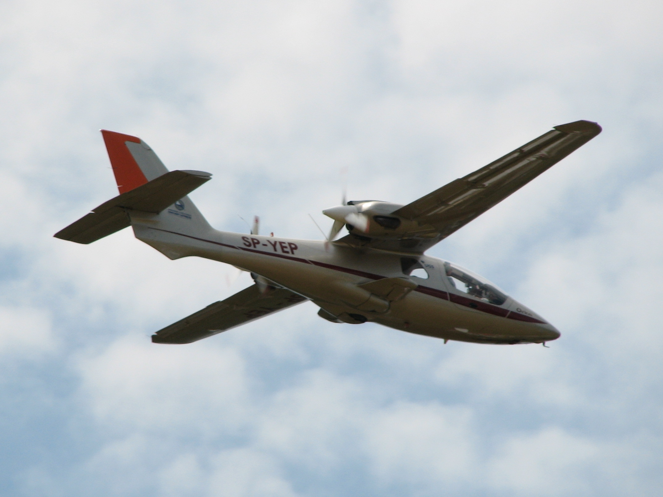 EM-11 Orka, tail number SP-YEP